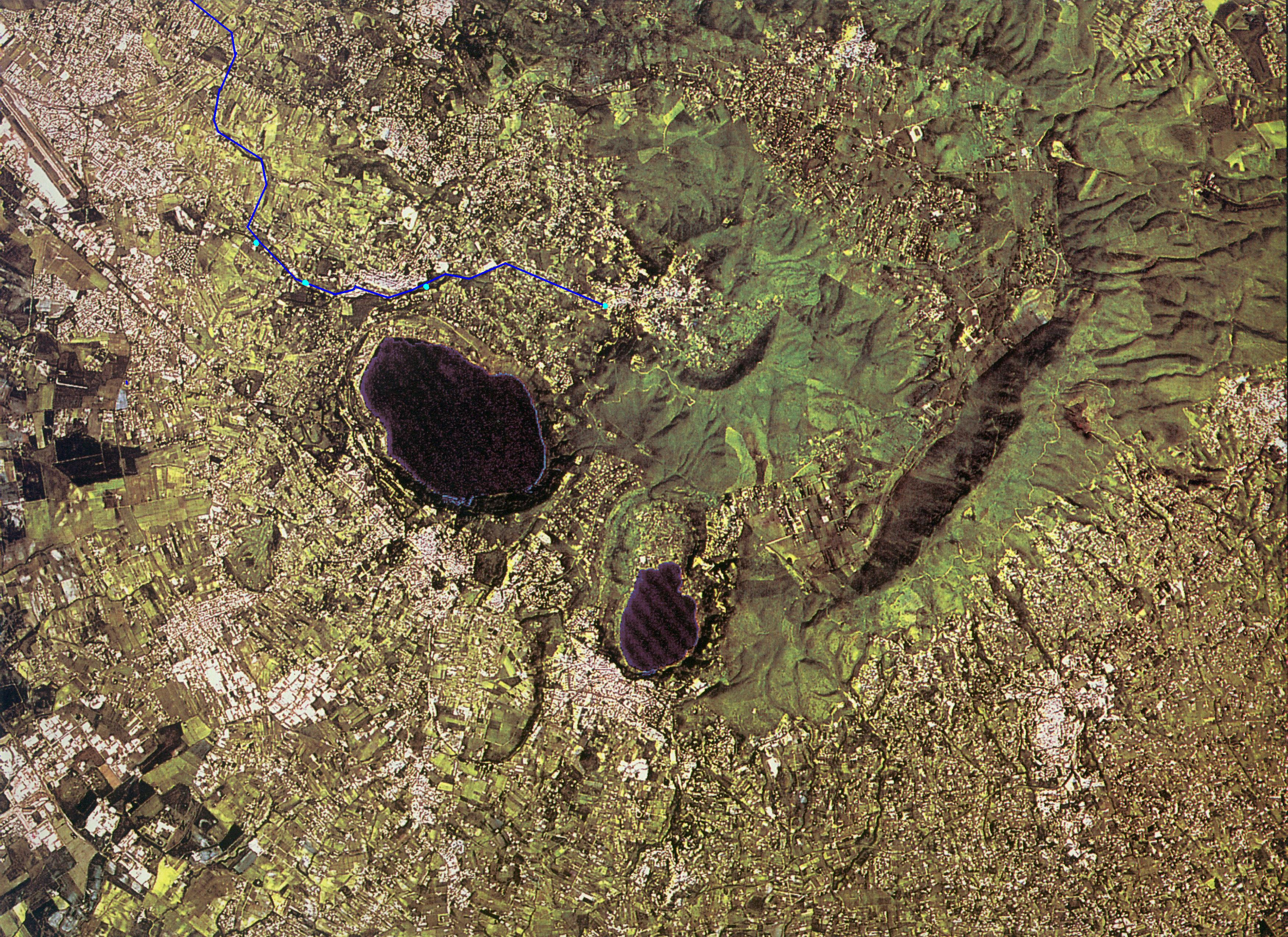 Marana delle Pietrare